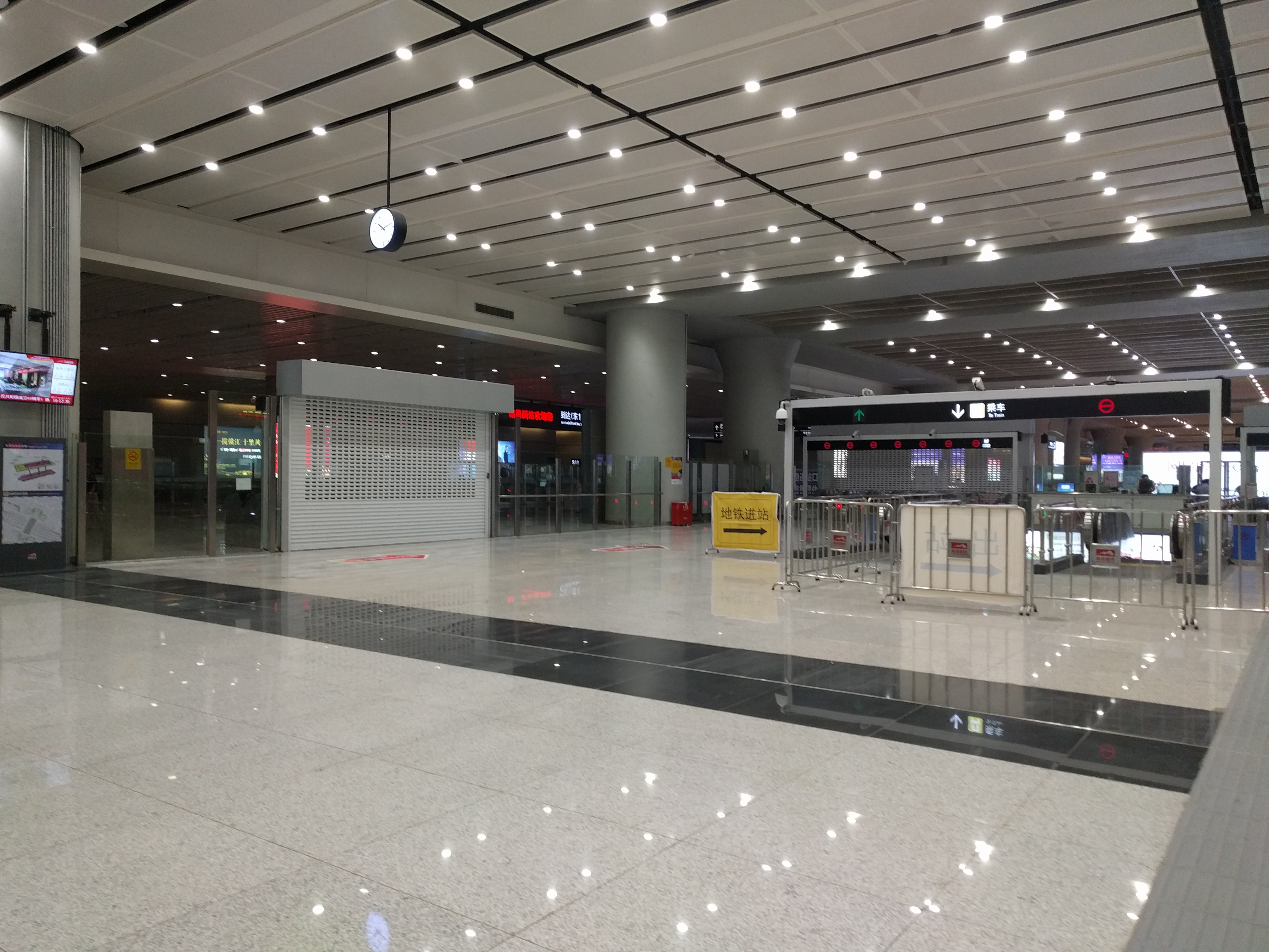 地铁南昌西站站厅